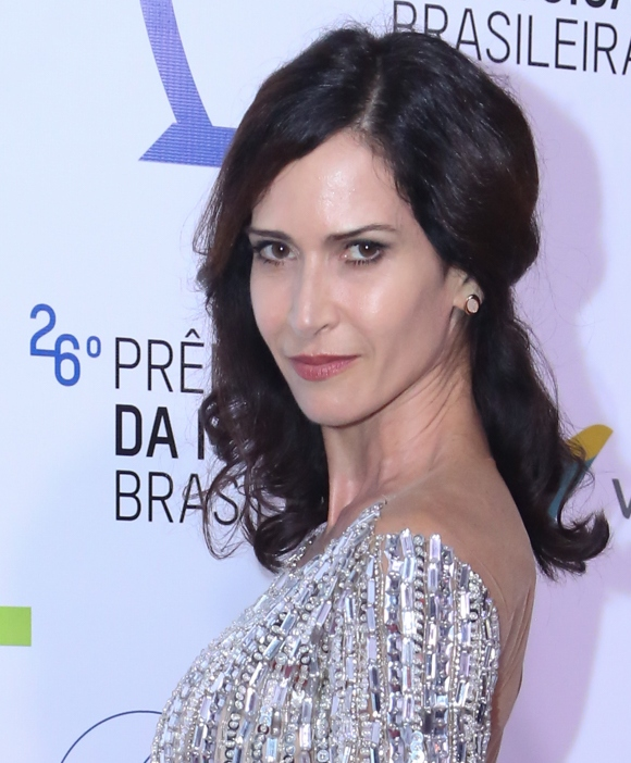 Atriz brasileira Ingra Liberato no 26° Prêmio da Música Brasileira 2015, no Theatro Municipal, no Centro do Rio de Janeiro/RJ. (10/06/15) Foto: Roberto Filho/Divulgacão